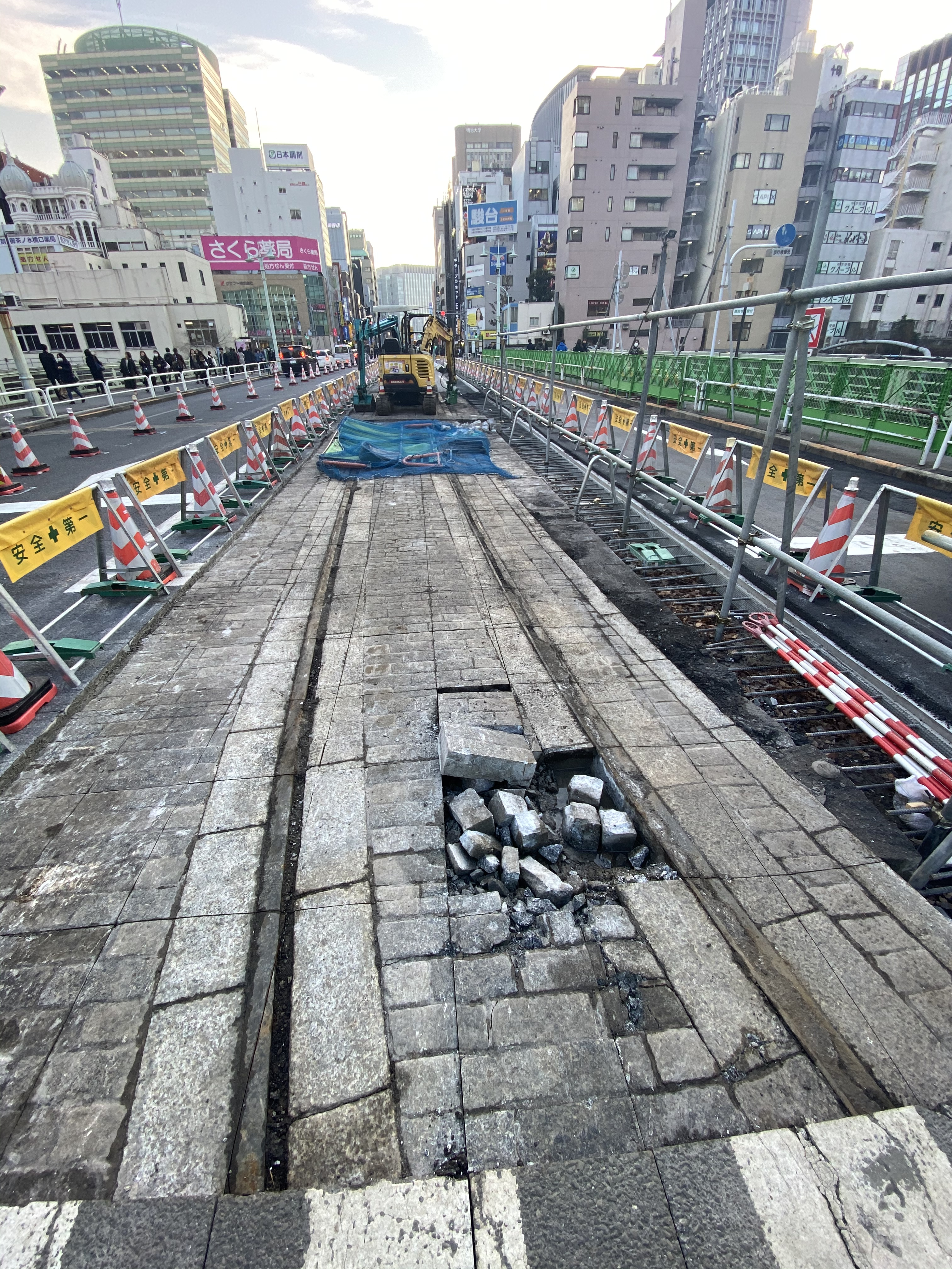 東京のど真ん中、お茶の水橋のアスファルトの下に眠っていた、旧東京市電錦町線のレールと敷石です。